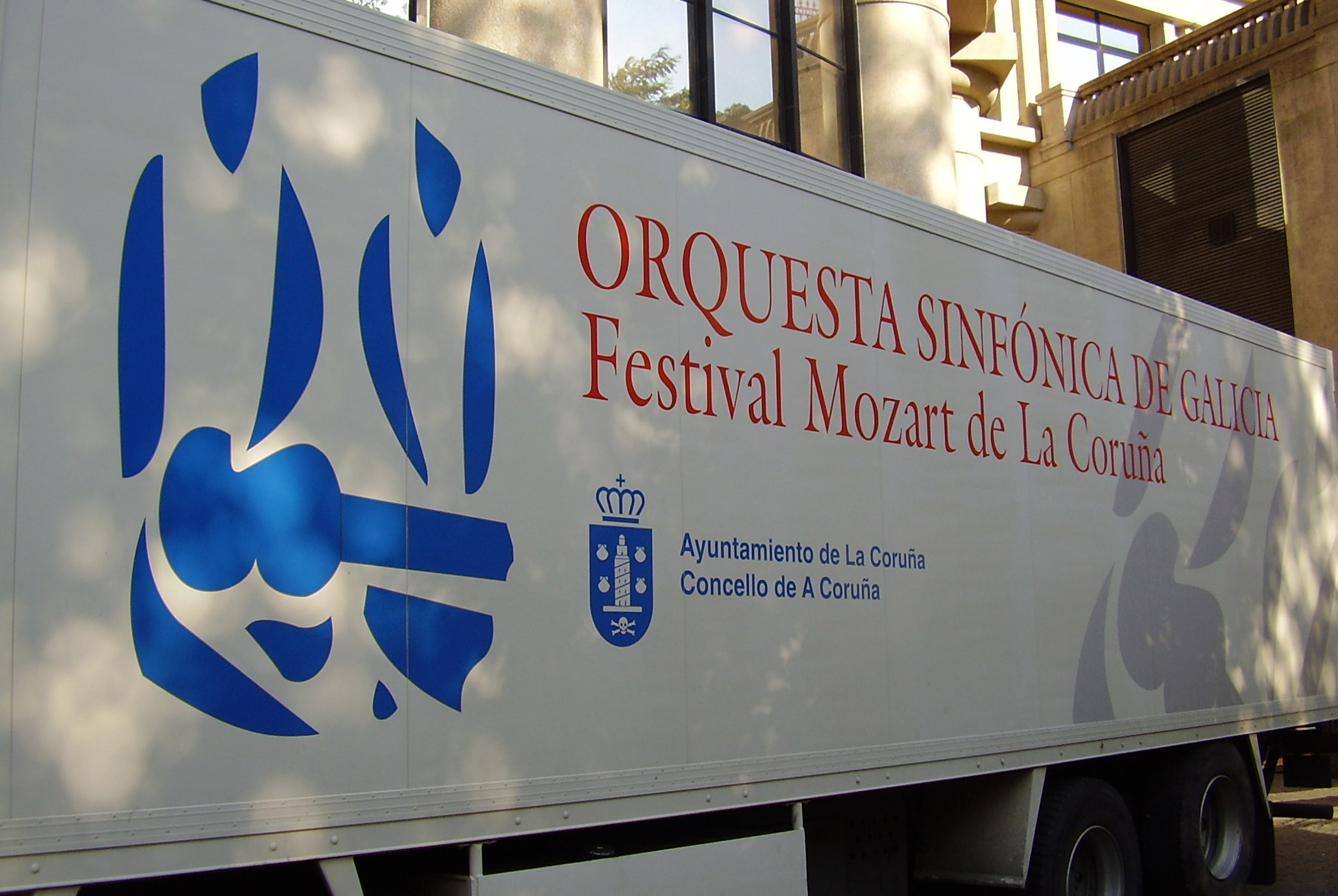 Camión de la Orquesta Sinfónica de Galicia